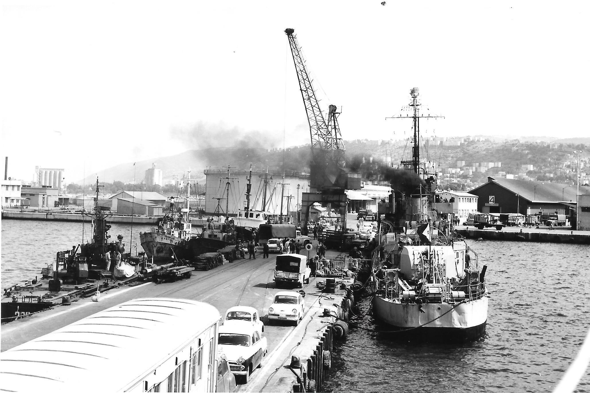 המשחתת אח"י חיפה (ק-38) וטרפדות חיל הים ברציף הצבאי בנמל חיפה בתקופת ההמתנה לקראת מלחמת ששת הימים.